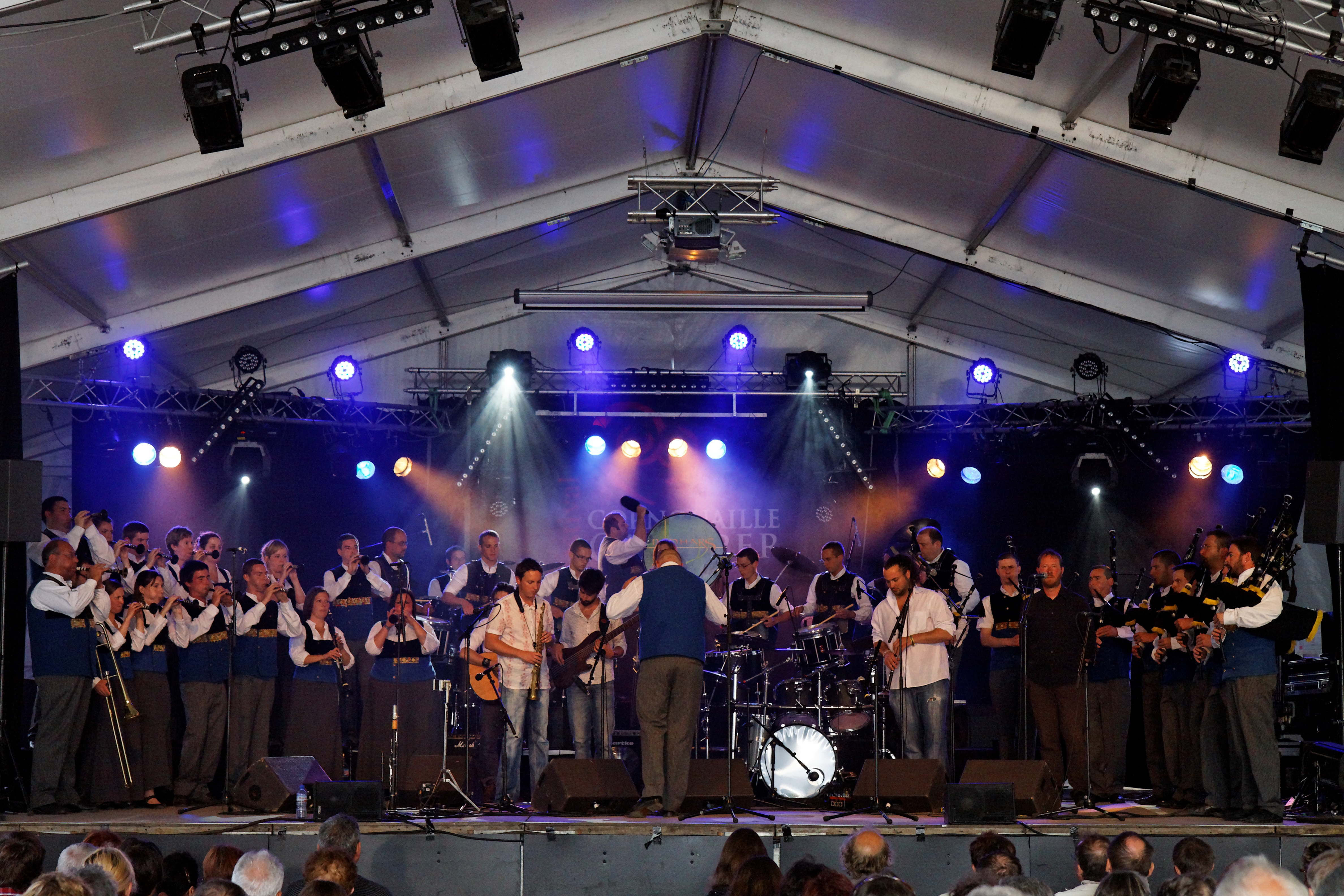 Bagad Penhars & Co en concert le 22 juillet lors du festival de Cornouaille 2011.